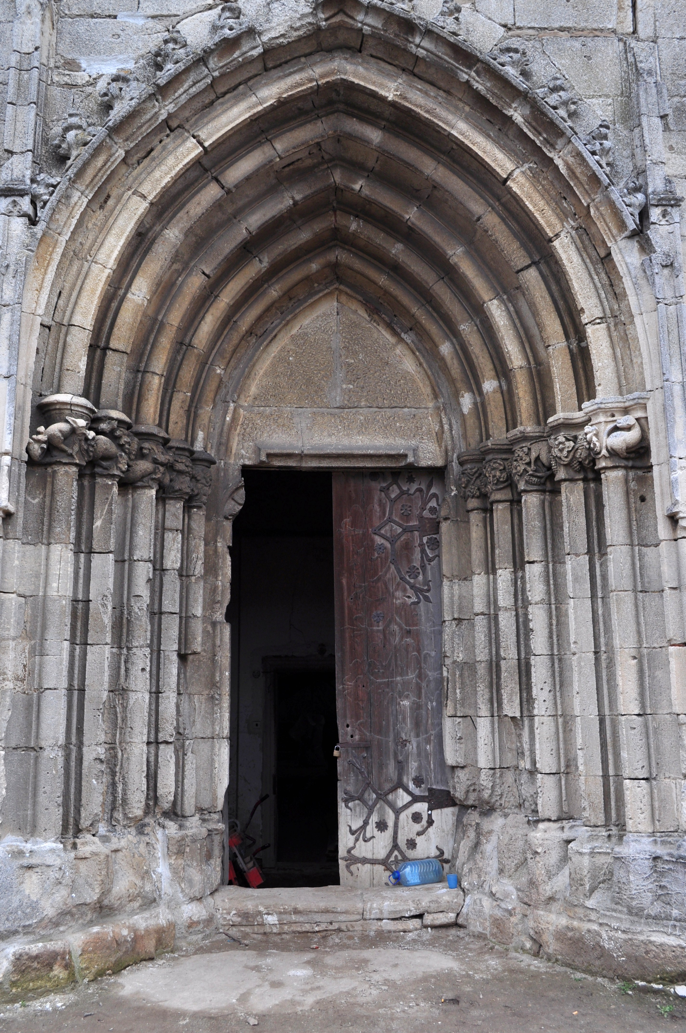 Ansamblul bisericii evanghelice fortificate, sat CURCIU; comuna DÂRLOS